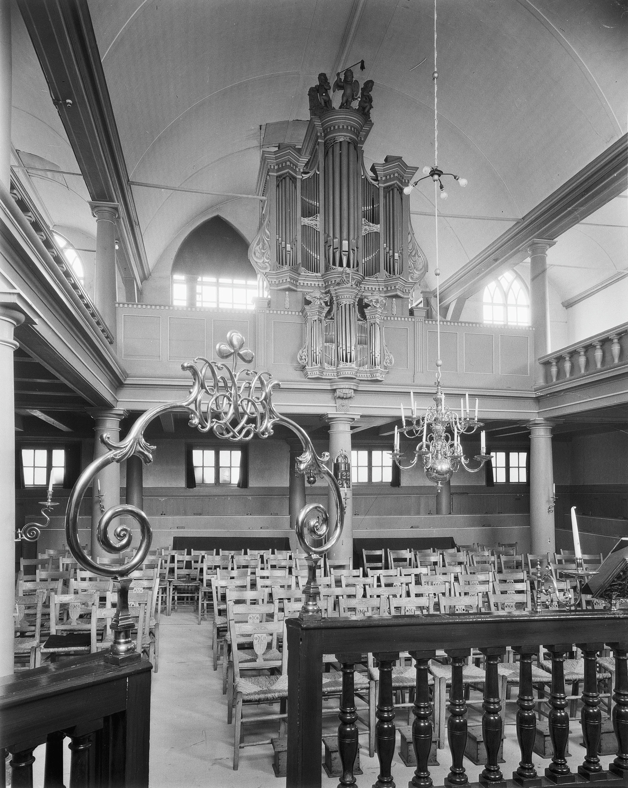 Remonstrantse kerk: interieur met orgel